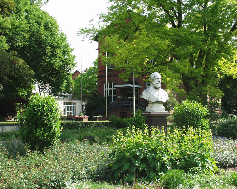 Denkmal Eduard von Lade mit Hauptgebäude der Forschungsanstalt Geisenheim (hinten rechts), fotografiert 2001